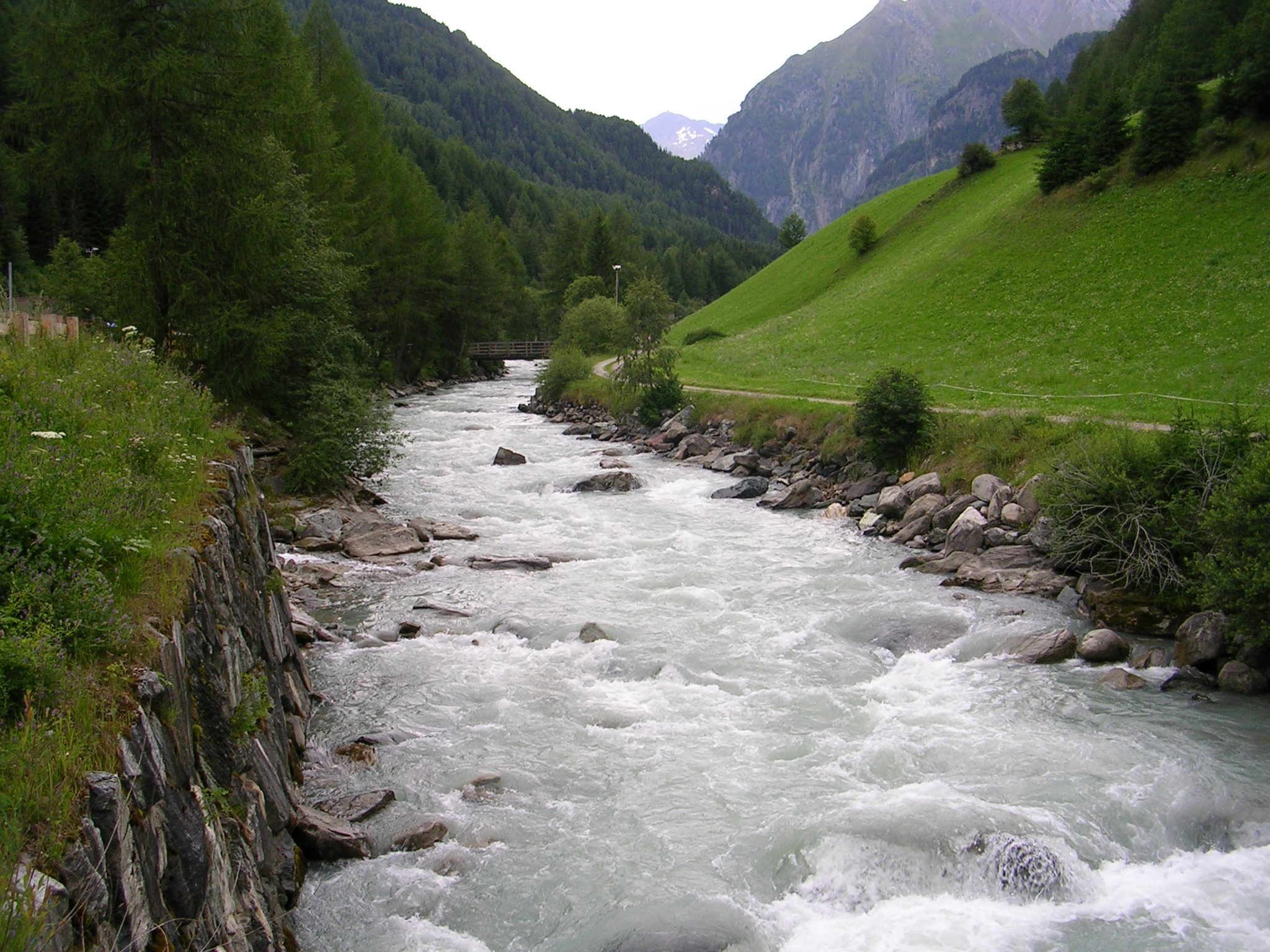 River Isel upriver of Prägraten am Großvenediger